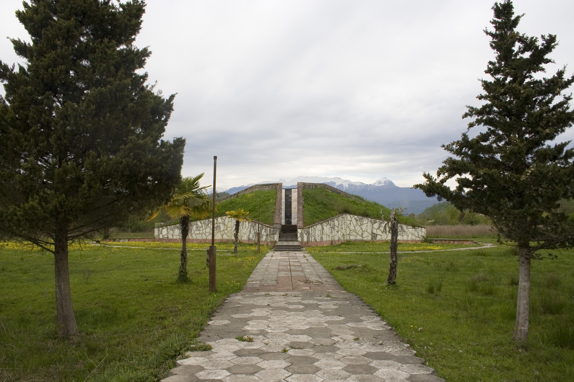 Цәкәара; вечный огонь в честь погибших на Второй Мировой войне жителей Абхазии (